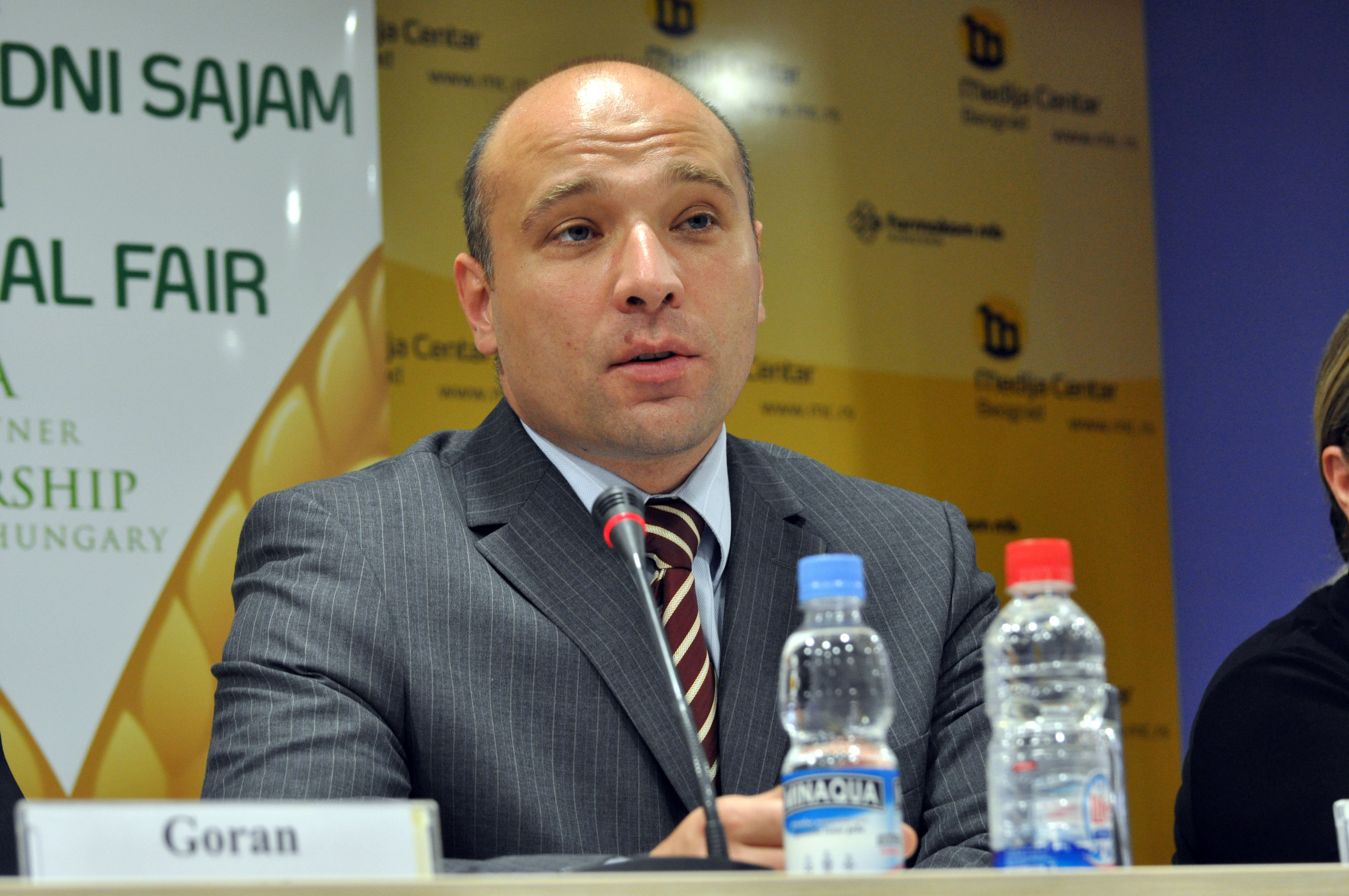 Саша Драгин на 77. Међународном сајму пољопривреде (11/5/2010)